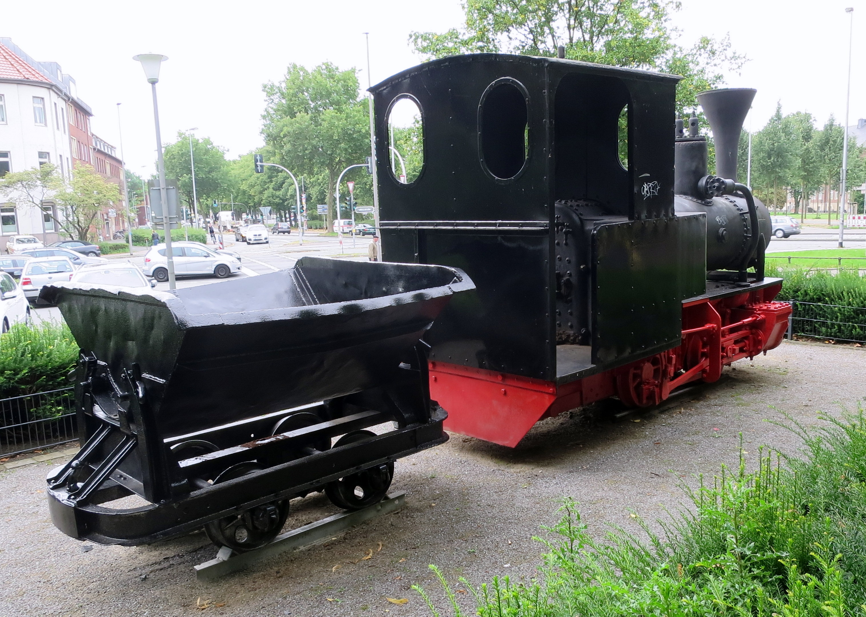 Eine Trümmerlok von 1945, als Denkmal aufgestellt